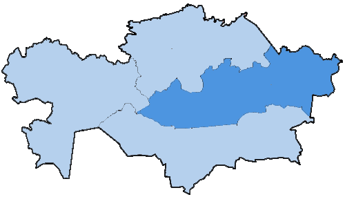 Mappa della diocesi di Karaganda, in Kazakistan. Lavoro personale eseguito a partire da File:Kazakhstan_provinces_numbered_english.png. Fonte per i confini delle diocesi: Guida delle missioni cattoliche 2005, a cura della Congregatio pro gentium evangelizatione, Roma, Urbaniana University Press, 2005.